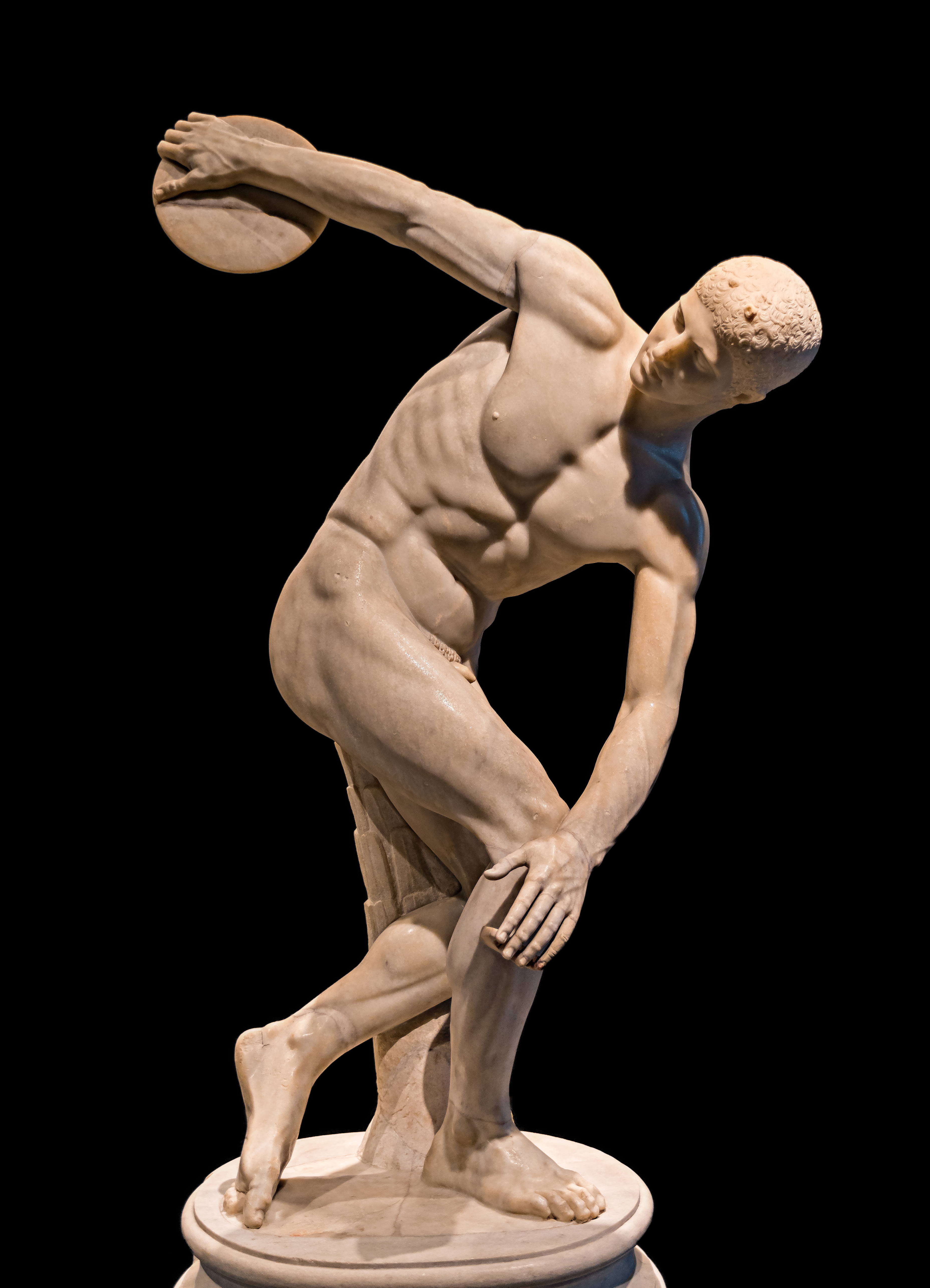 Der sogenannte Diskobolos Lancelotti, eine aus dem 2. Jahrhundert gefertigte römische Marmorkopie, die 1781 auf dem Esquilin gefunden wurde und im Nationalmuseum Palazzo Massimo in Rom ausgestellt ist (Inv. 126371). Bei dem Original handelt es sich um eine verlorene Bronzestatue des griechischen Bildhauers Myron aus dem 5. Jahrhundert v. Chr.